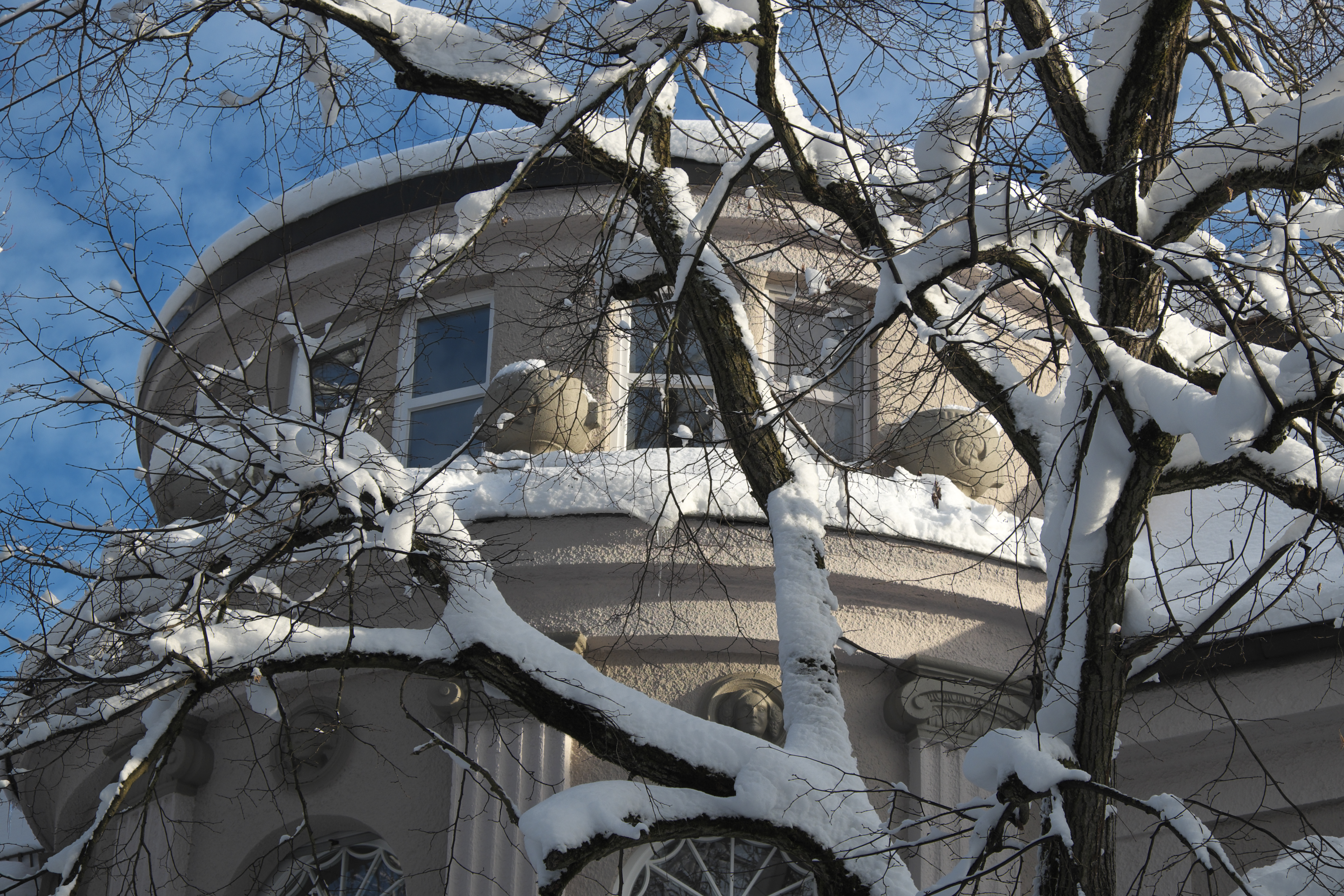 Villa am Schirmerweg 18 in Obermenzing im Stadtbezirk Pasing-Obermenzing in München (Bayern/Deutschland), 1912 von Hermann Lang erbaut